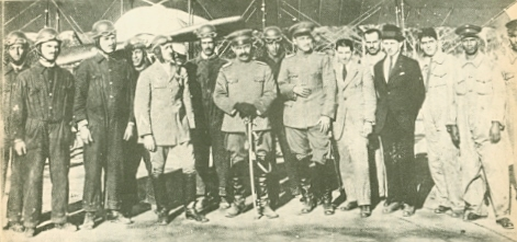 Fotografía de los pioneros de la Aviación Militar de Venezuela junto al Presidente (Dictatorial) de la Nación, el General Juan Vicente Gómez